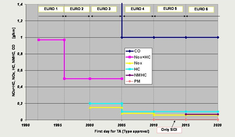 Das Bild zeigt die Entwicklung der Schadstofflimitierung innerhalb der Europäischen Union von Anfang an bis heute, Euro 6 für die Limitierung bei Ottomotoren.